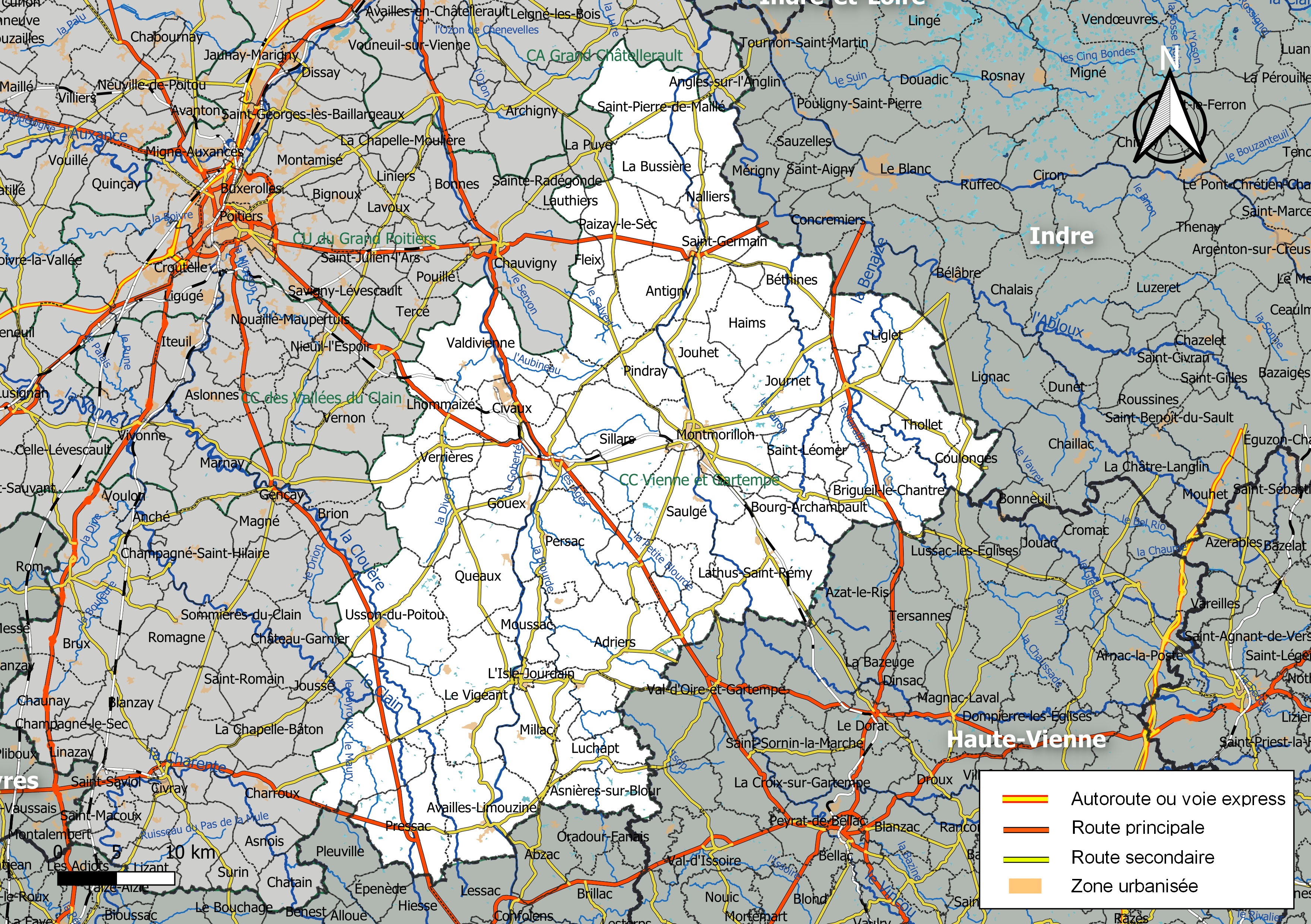 Carte géographique de la Communauté de communes Vienne et Gartempe, département de la Vienne, France. Composition au 1er janvier 2019.